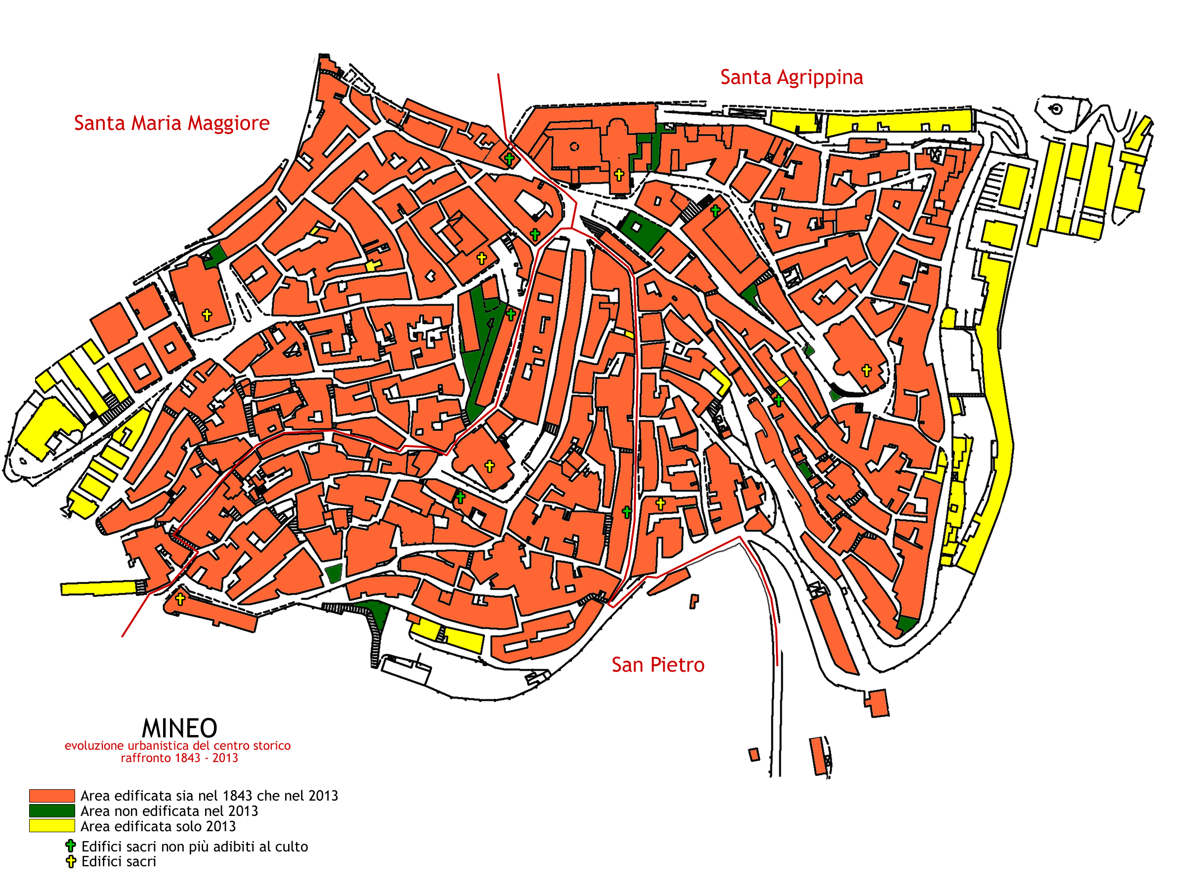 Ripartizione in quartieri di Mineo